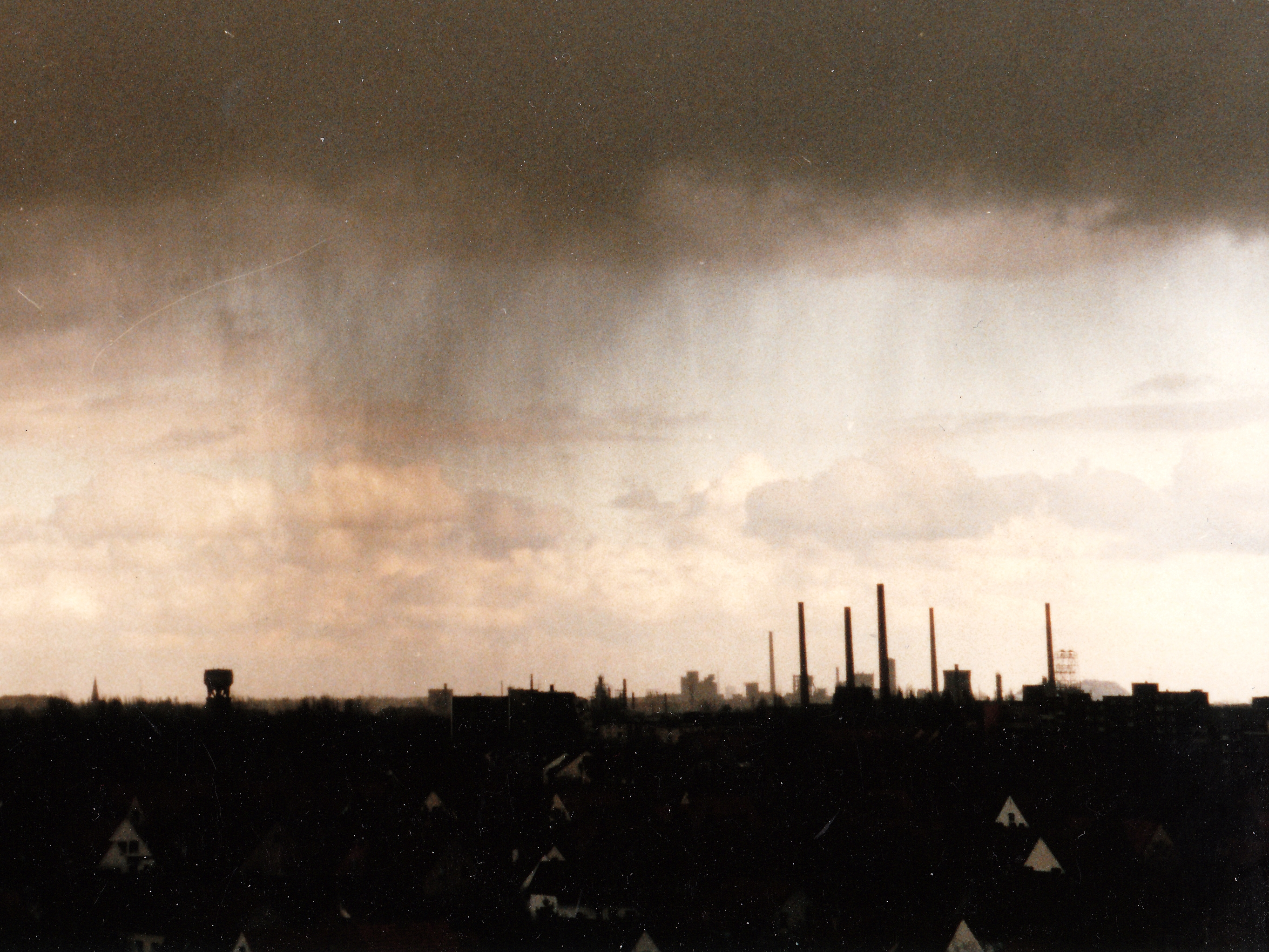 Türme der Deurag-Nerag-Werke in Anderten-Misburg, von einem Hochhaus im Roderbruch aus aufgenommen. Links der Wasserturm von Misburg. Ca. 1984.